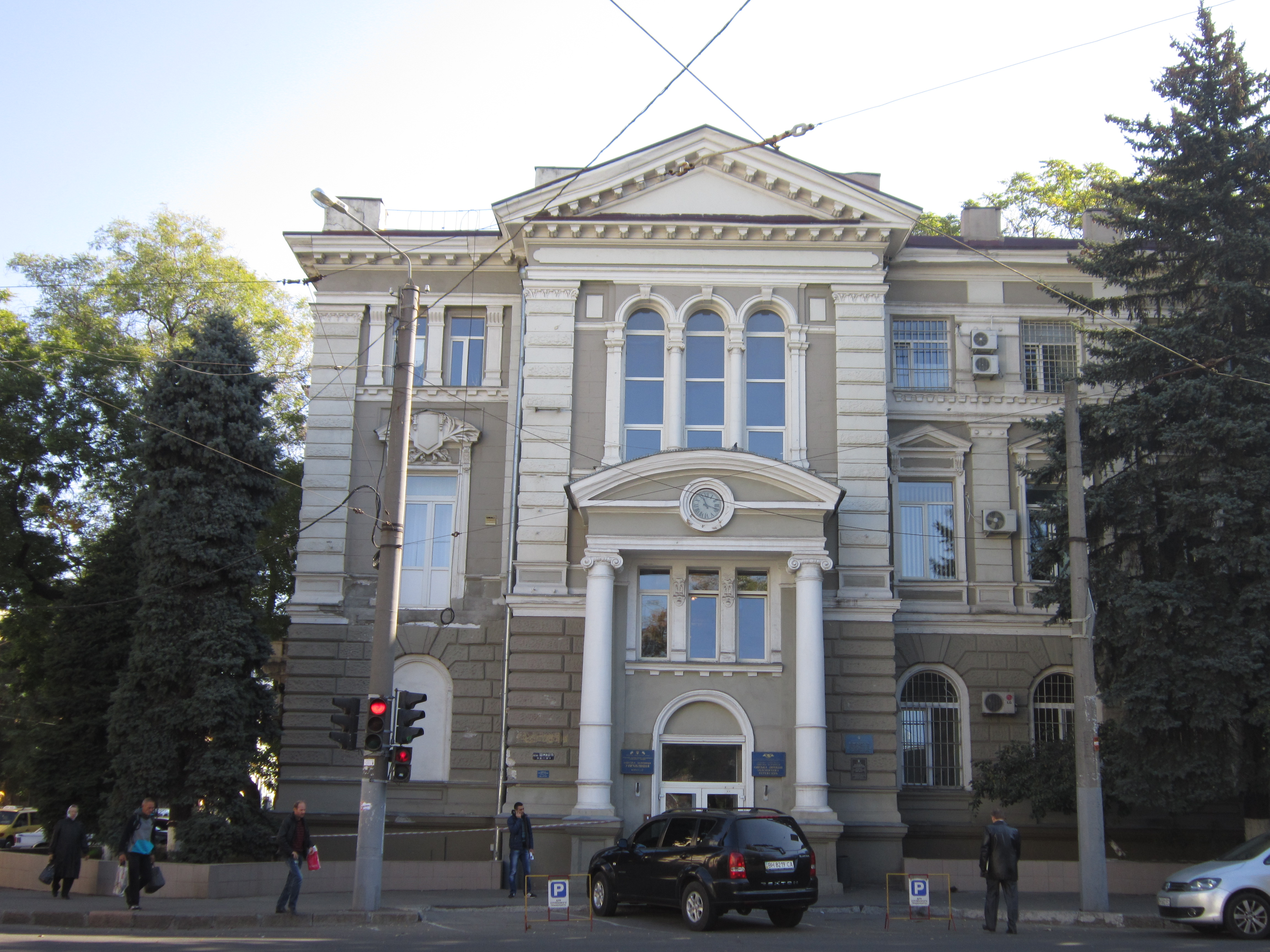 Будинок земської управи; історичне місце на території колишньої в’язниці, де у 1879 р. були ув’язнені народовольці Д.Лізогуб, І.Давиденко, С.Чубаров;у 1882 р. були страчені С.Халтурін та М.Желваков.У 1905 році у цьому будинку відбулося засідання Пленуму Ради робітничих депутатів Міського району, Одеса, Пантелеймонівська вул., 17/23 (ріг вул. Пантелеймонівської, 17 та пров. Лейтенанта Шмідта, 23)